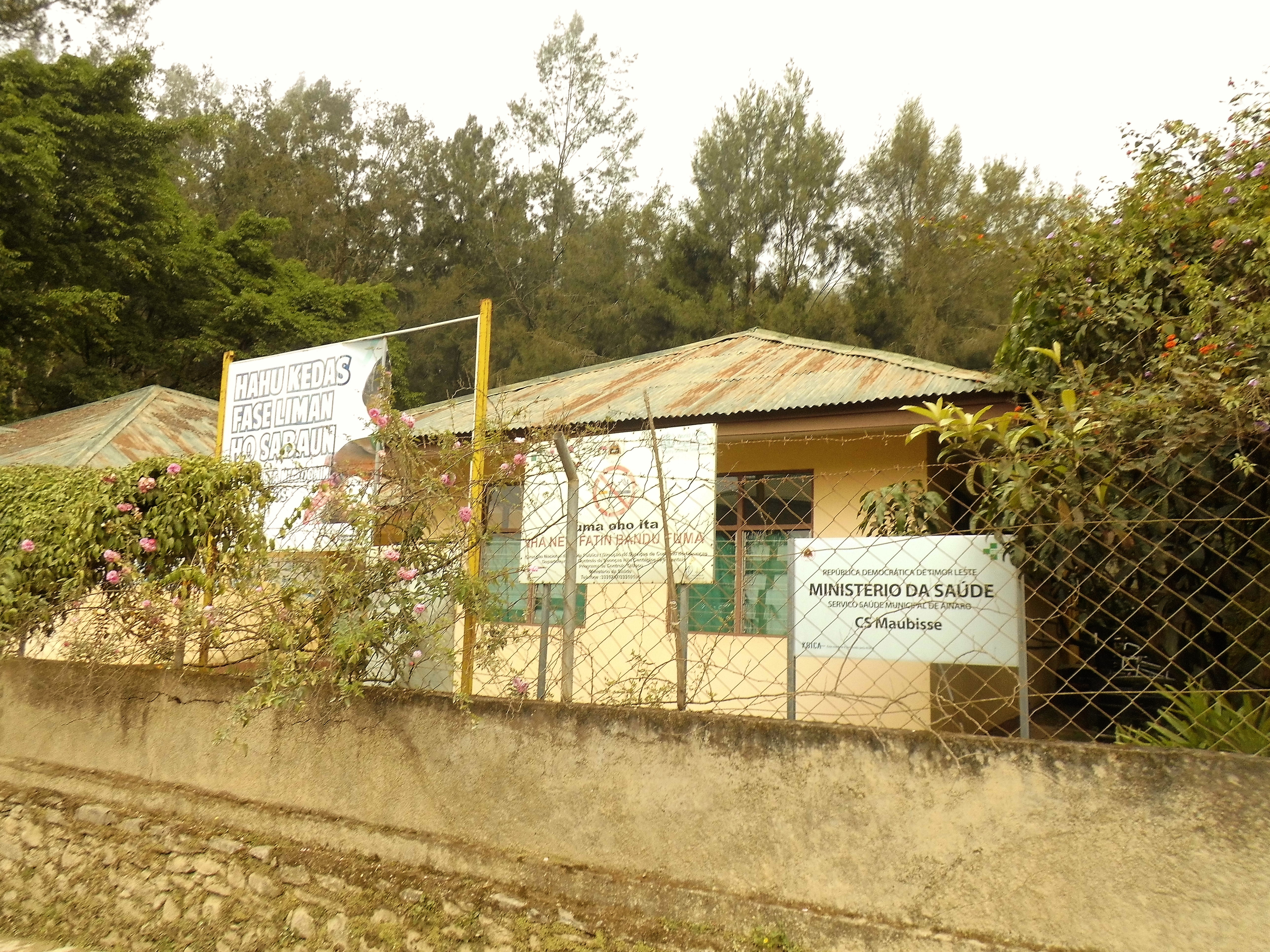 Servico Saude Municipal de Ainaro, Maubisse